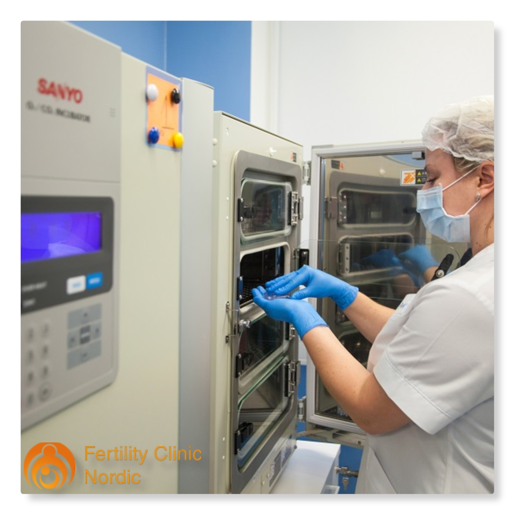 Viljatusravi protseduur viljakuskliinikus Fertility Clinic Nordicus.